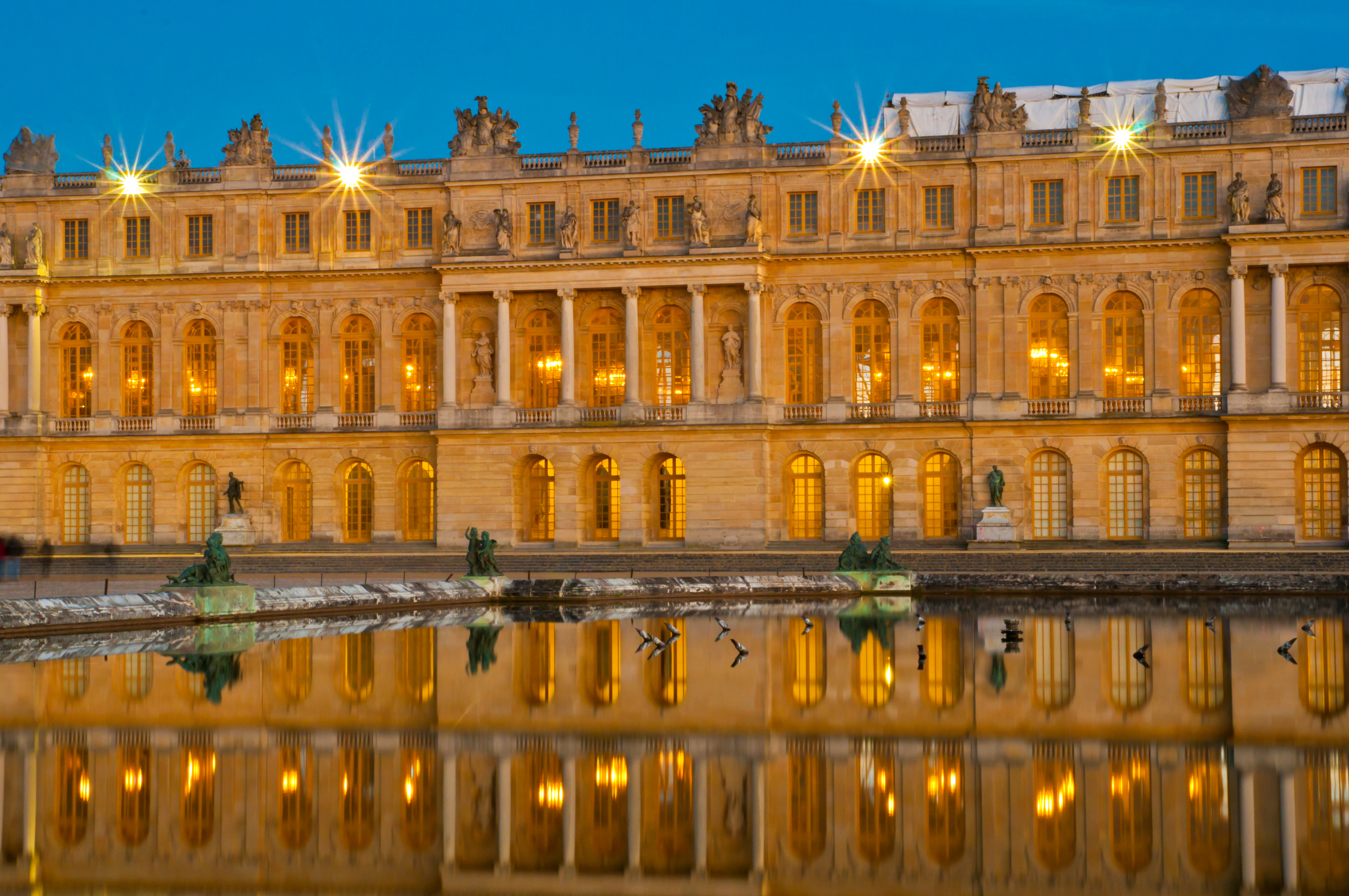 Château de Versailles by night